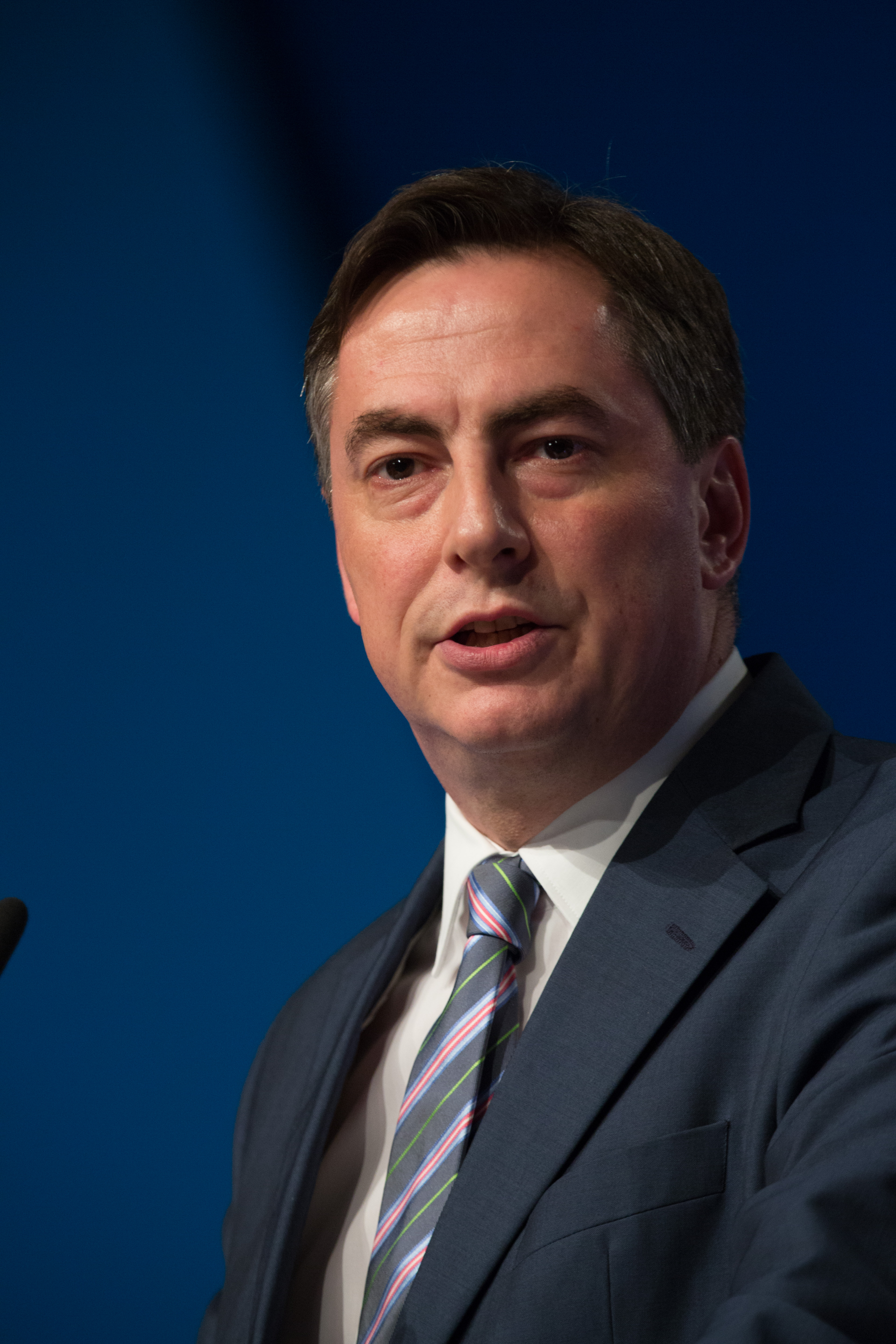 David McAllister, Mitglied des CDU-Bundesvorstandes auf dem 29. Parteitag der CDU Deutschlands am 6. Dezember 2016 in Essen, Grugahalle